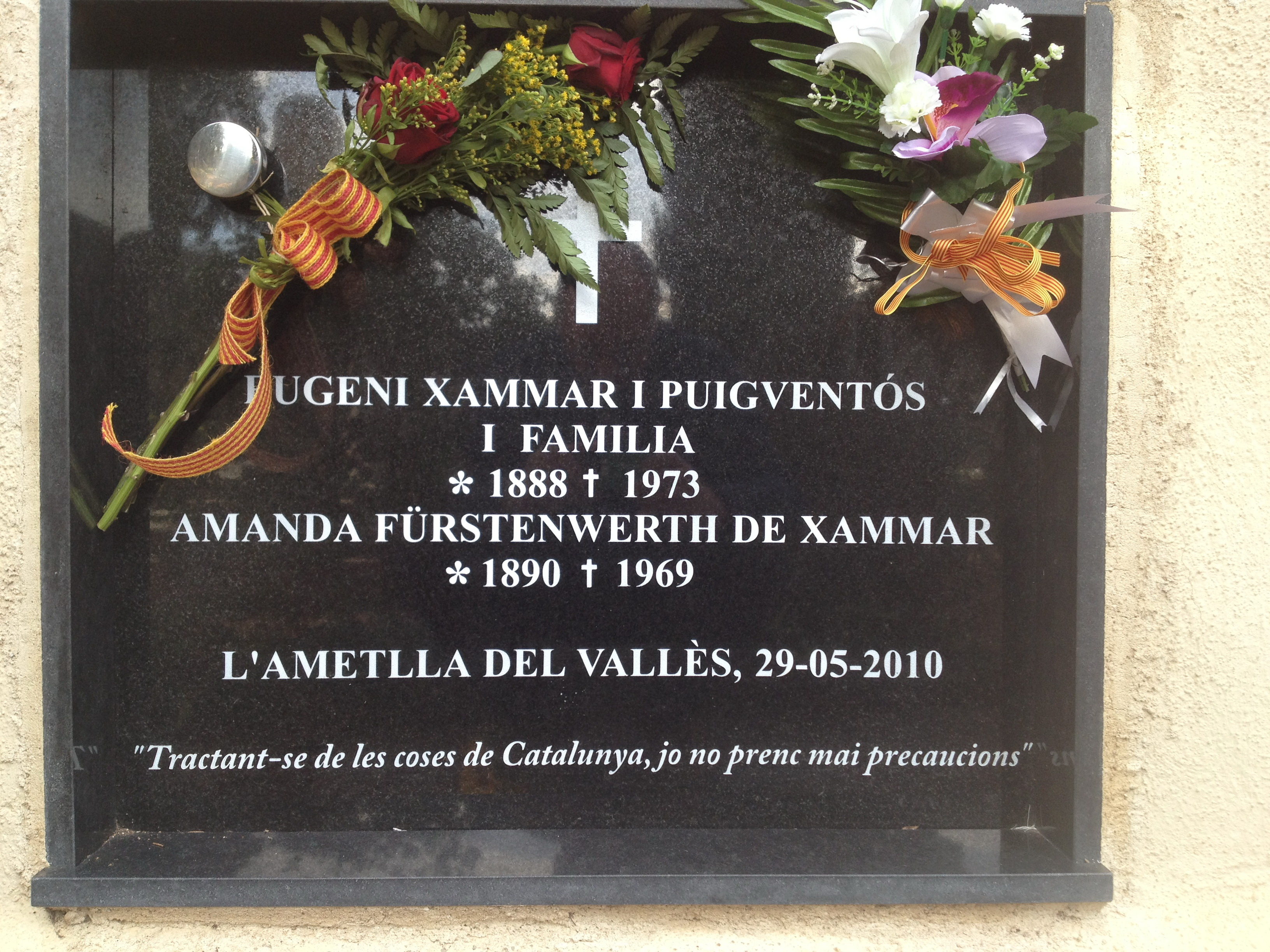 Tombstone from Eugeni Xammar at l'Ametlla del Vallès cementiri